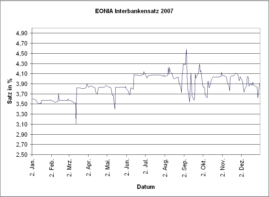 Verlauf des EONIA Interbankensatzes während des Jahres 2007